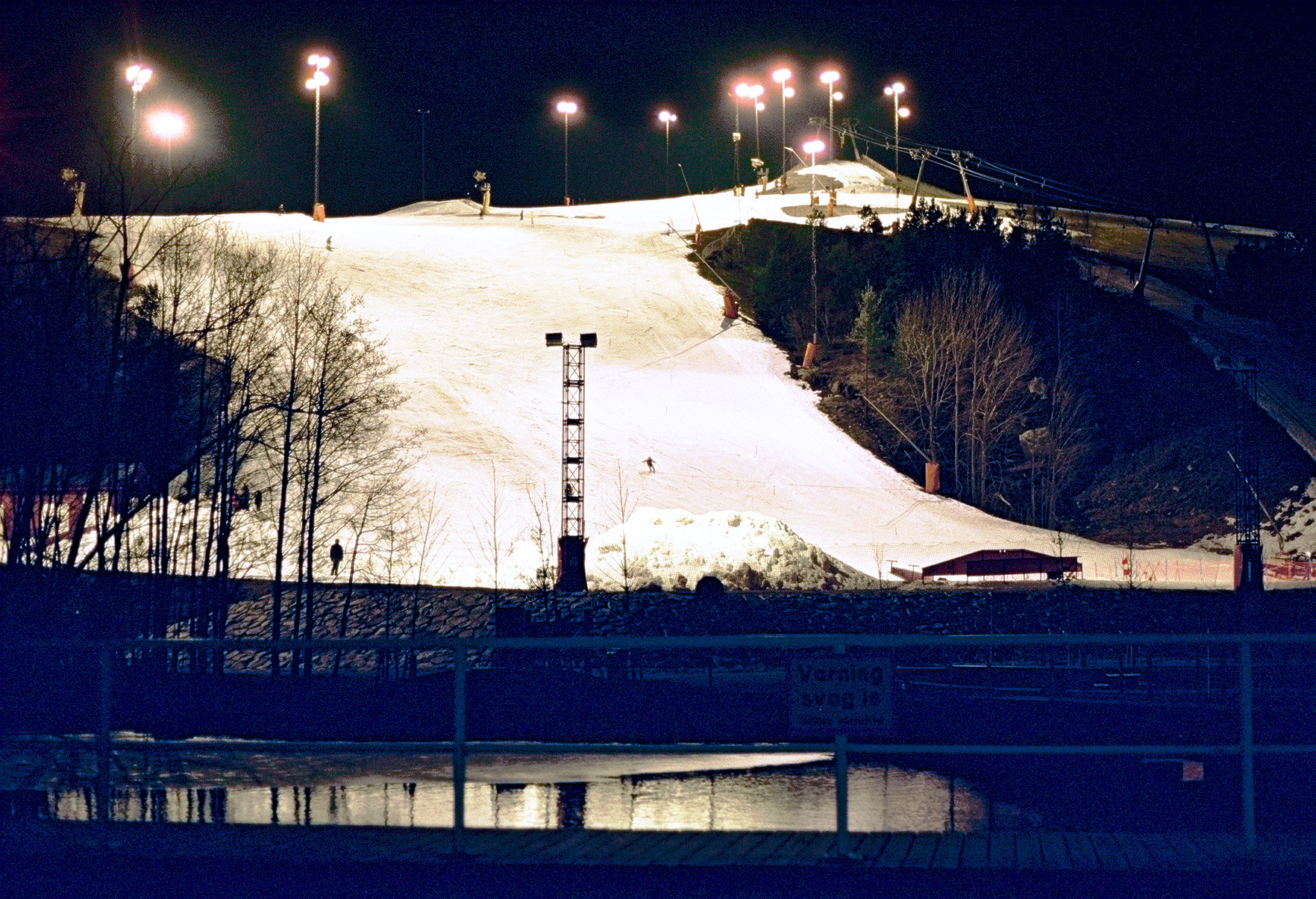 Hammarbybacken